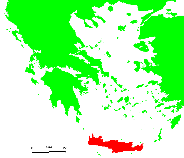 GR Kreta.PNG (Greek island)